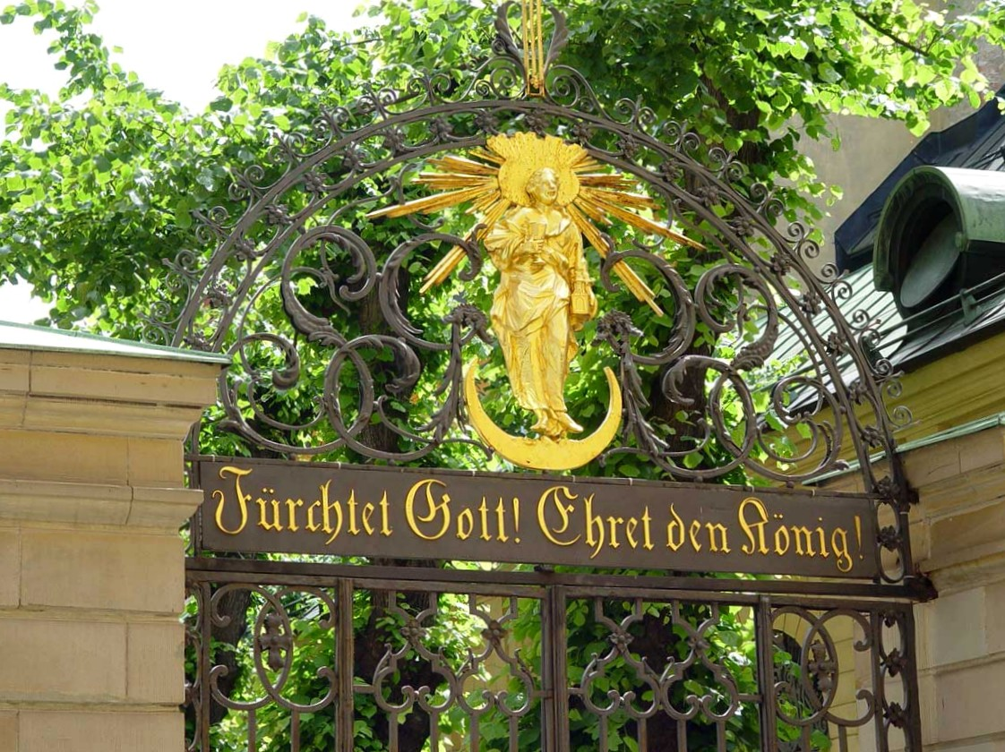 Tyska kyrka (Deutsche Kirche) in Stockholm, Gamla stan.